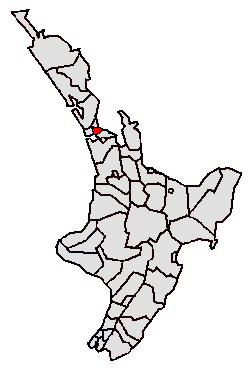 Die Karte zeigt die Lage des Auckland City Council auf der Nordinsel Neuseelands rot